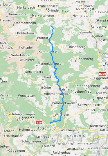 carte réalisée sur umap This map may be incomplete, and may contain errors. Don't rely solely on it for navigation.